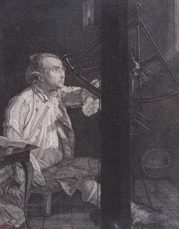 Léonard Defrance (1735–1805): Der Astronom Antoine Darquier de Pellepoix (1718–1802). Öl auf Leinwand, 135 x 109 cm. Privatsammlung. (Françoise Dehousse, Maïté Pacco, Maurice Pauchen: Léonard Defrance. L’œuvre peint. Liège 1985, Kat.-Nr. 19.) Entstanden in Toulouse.